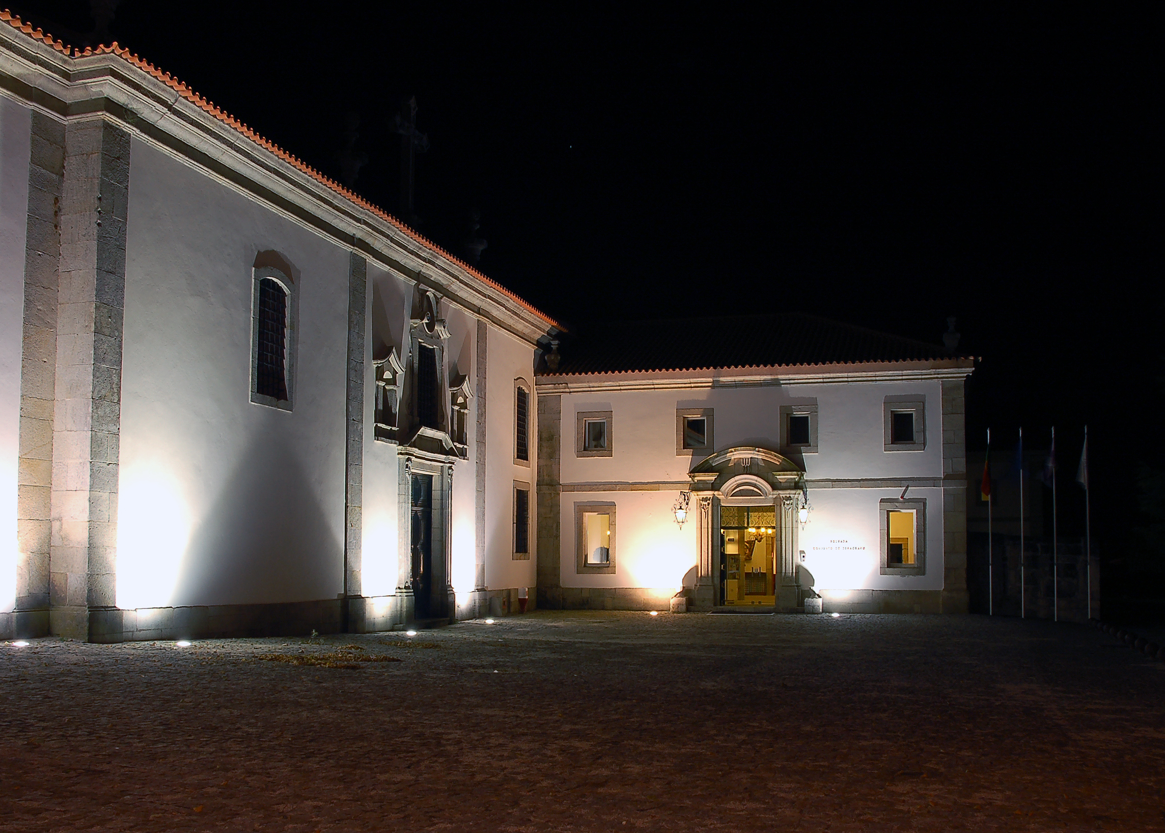 Convento do Desagravo do Séc. XVIII e está localizado perto da Serra da Estrela e Serra do Açôr c/ ambiente romântico e traquilo.